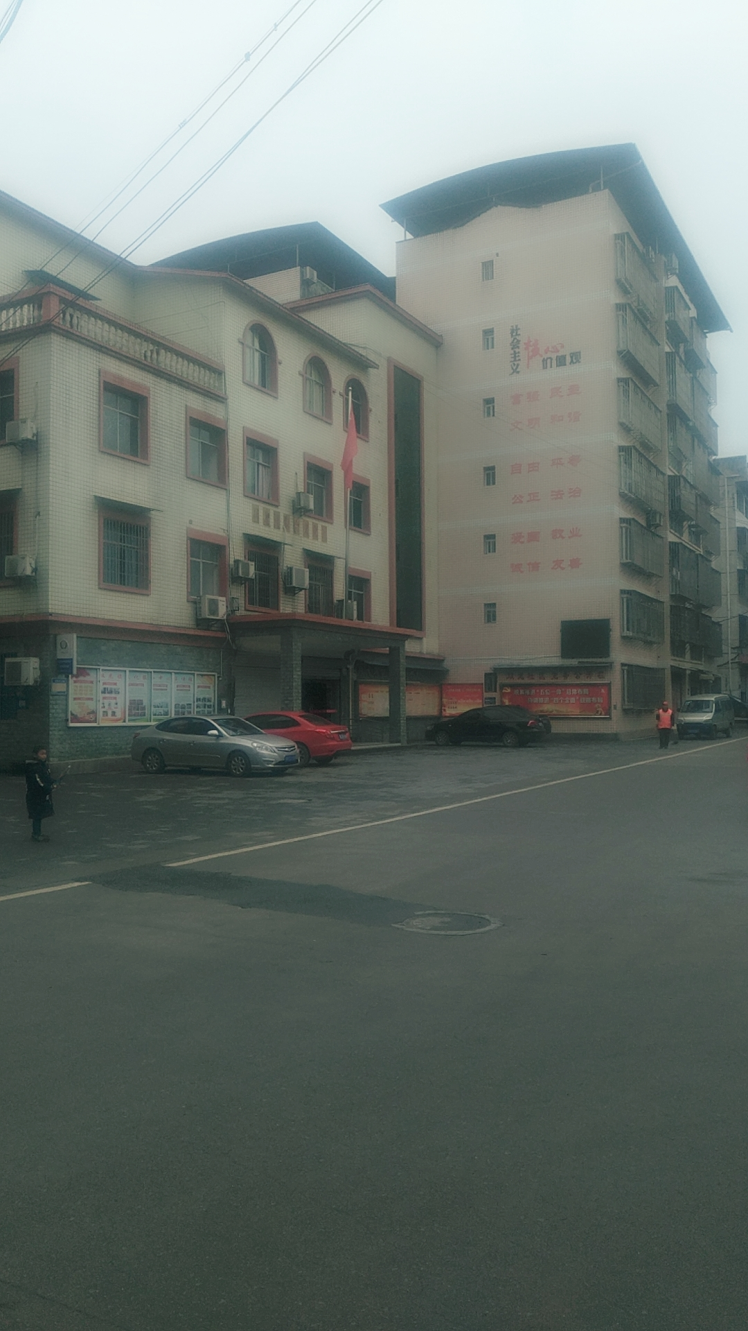 A government building in shuanglong town, longevity district, chongqing, China